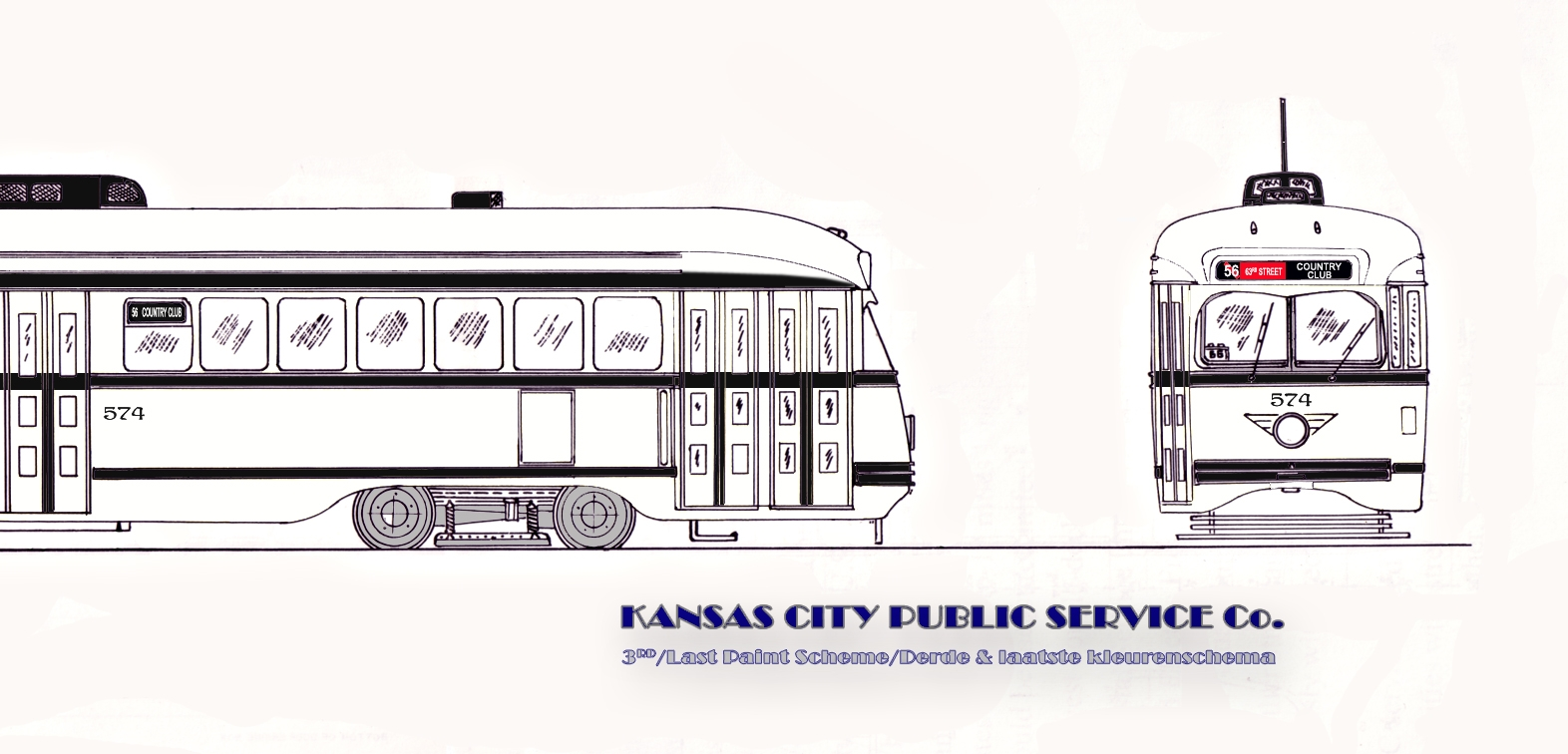 Zelfgetekend, gescand en ingekleurd met Photoshop CD Categorie:Afbeelding tram